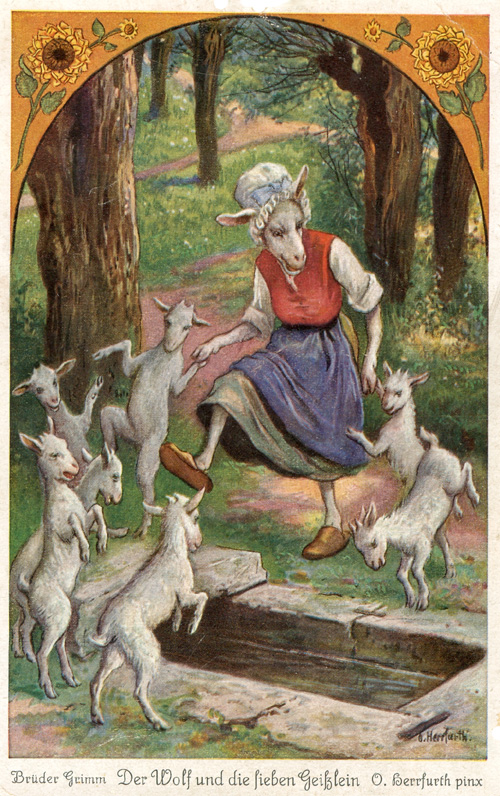 Der Wolf und die sieben Geißlein. Postkartenserie nach dem Märchen. Serie von sechs Postkarten der Firma Uvachrom. Serie 265, Nr. 4521 Text der Rückseite: Als der Wolf erwachte, ging er zum Brunnen, um zu trinken. Er bückte sich zum Wasser hinab, da zogen ihn die schweren Steine in seinem Bauch in die Tiefe. Jämmerlich mußte er ertrinken. Die Alte mit ihren sieben Geißlein aber tanzte voll Freude um den Brunnen und rief: „Der Wolf ist tot!“